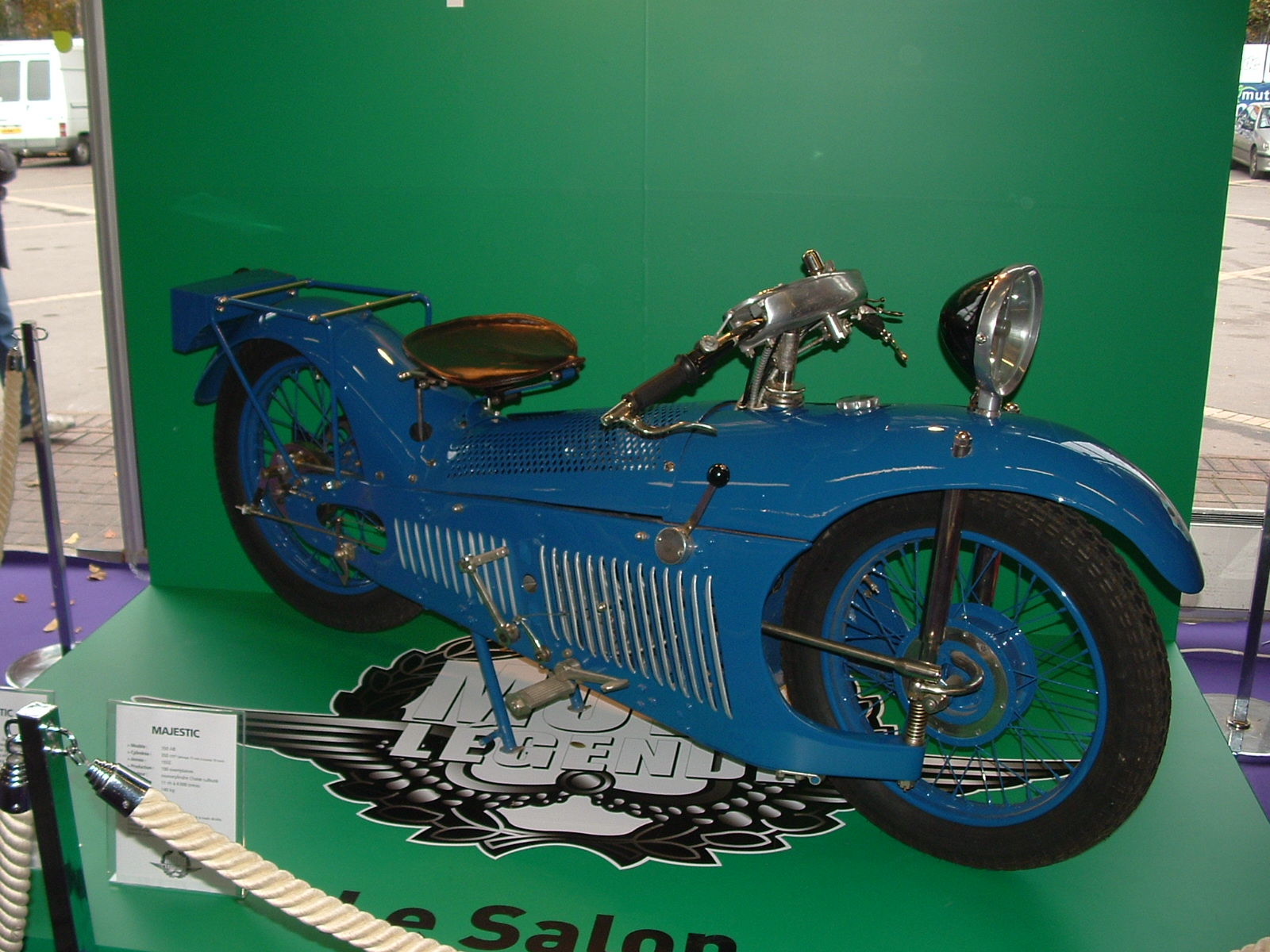 Moto de marque Majestic et de frabrication française